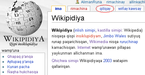 Runa Simi: no original description